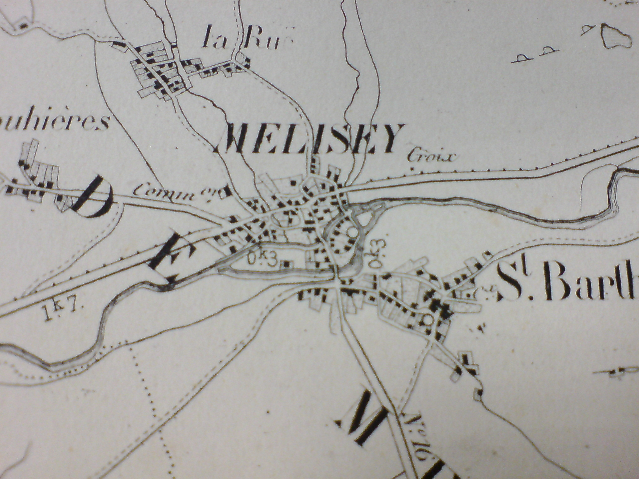 Photographie de Melisey sur l'Atlas Cantonal des communes de Haute-Saône, 1858